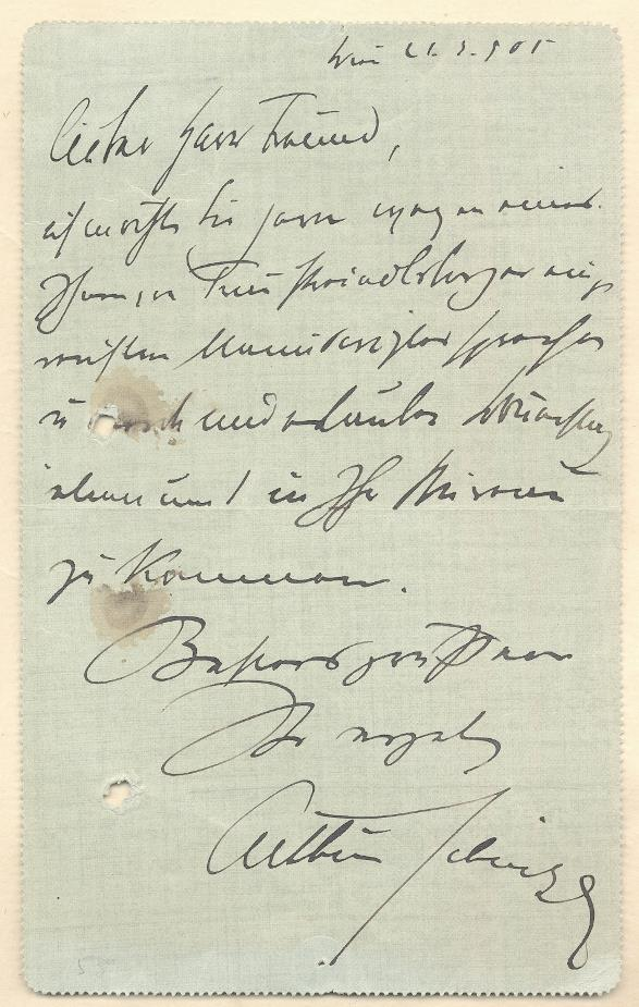 Brief Arthur Schnitzler an Fritz Freund vom Wiener Verlag, Wien, 21. 4. 1905 "… Ich möchte Sie gern wegen eines Ihnen von Frau Steindlxxx eingereichten Manuscriptes sprechen und erlaube mir Dienstag … um 1 in Ihr Bureau zu kommen …"